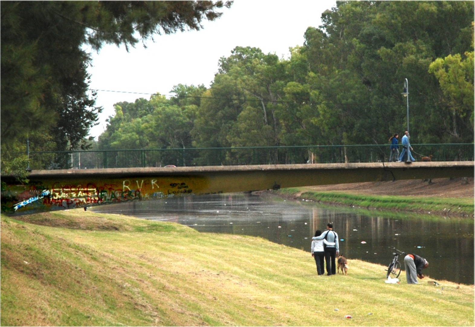 Arroyo Pergamino, ciudad de Pergamino, provincia de Buenos Aires, Argentina